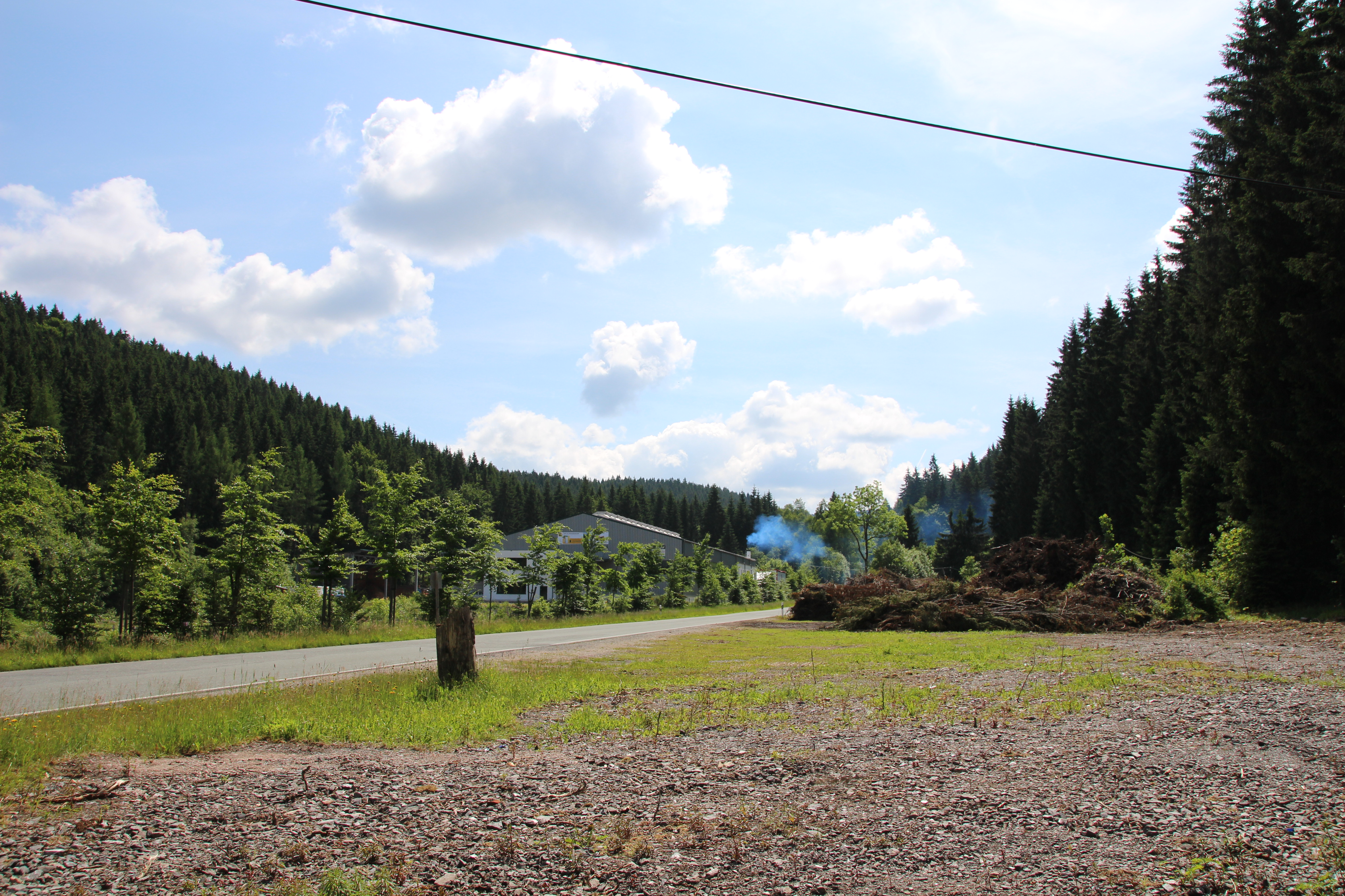 Wilzschmühle (Eibenstock): Eine frühere kleine Siedlung im Tal der Wilzsch in einer Höhe von etwa 675 bis 690 Metern, deren Mittelpunkt im Jahr 2015 einen Anlage zur Produktion von Holzbrennstoffen ist. Im Bereich des Reisiglagers verliefen früher die Schienen der Schmalspurbahn Wilkau-Haßlau–Carlsfeld, und hier war der "Haltepunkt Wilzschmühle". Eine Brücke über die Wilzsch ist im Jahr 2015 von der früheren Eisenbahnstrecke noch vorhanden. Hochbauten haben sich nicht erhalten. Reste der früheren Bahnanlagen sind hier [1] abgebildet.